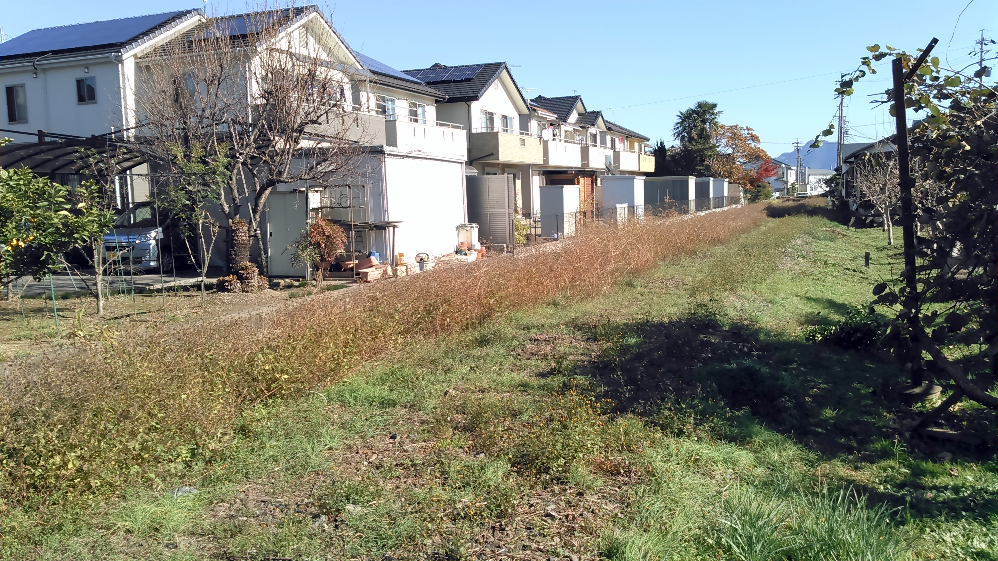 川部橋駅があった空き地。